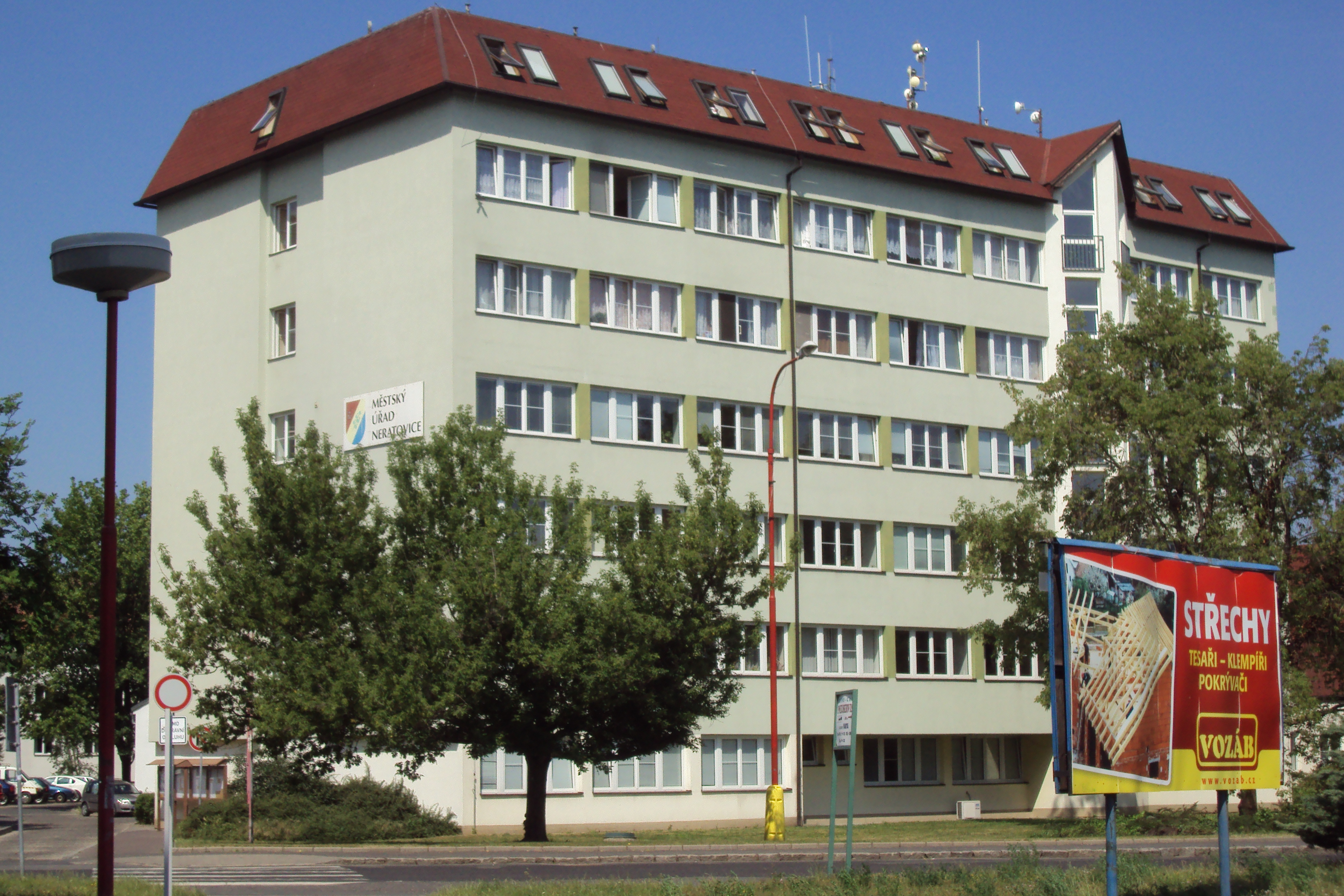 Radnice v Neratovicích, pohled z Kojetické ulice